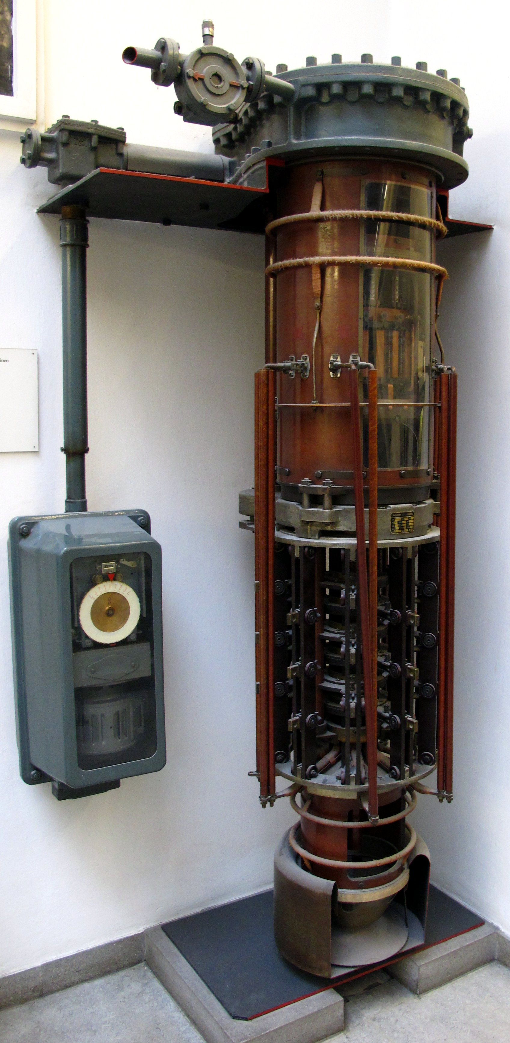 Stufenschalter eines 30-kV-Leistungstransformators nach Jansen aus 1952. Dieser Stufenschalter, rechte Einheit, befand sich gemeinsam mit dem Leistungstransformator im Transformatorgehäuser unter Öl. Einheit links dient der Einstellung und Kontrolle.